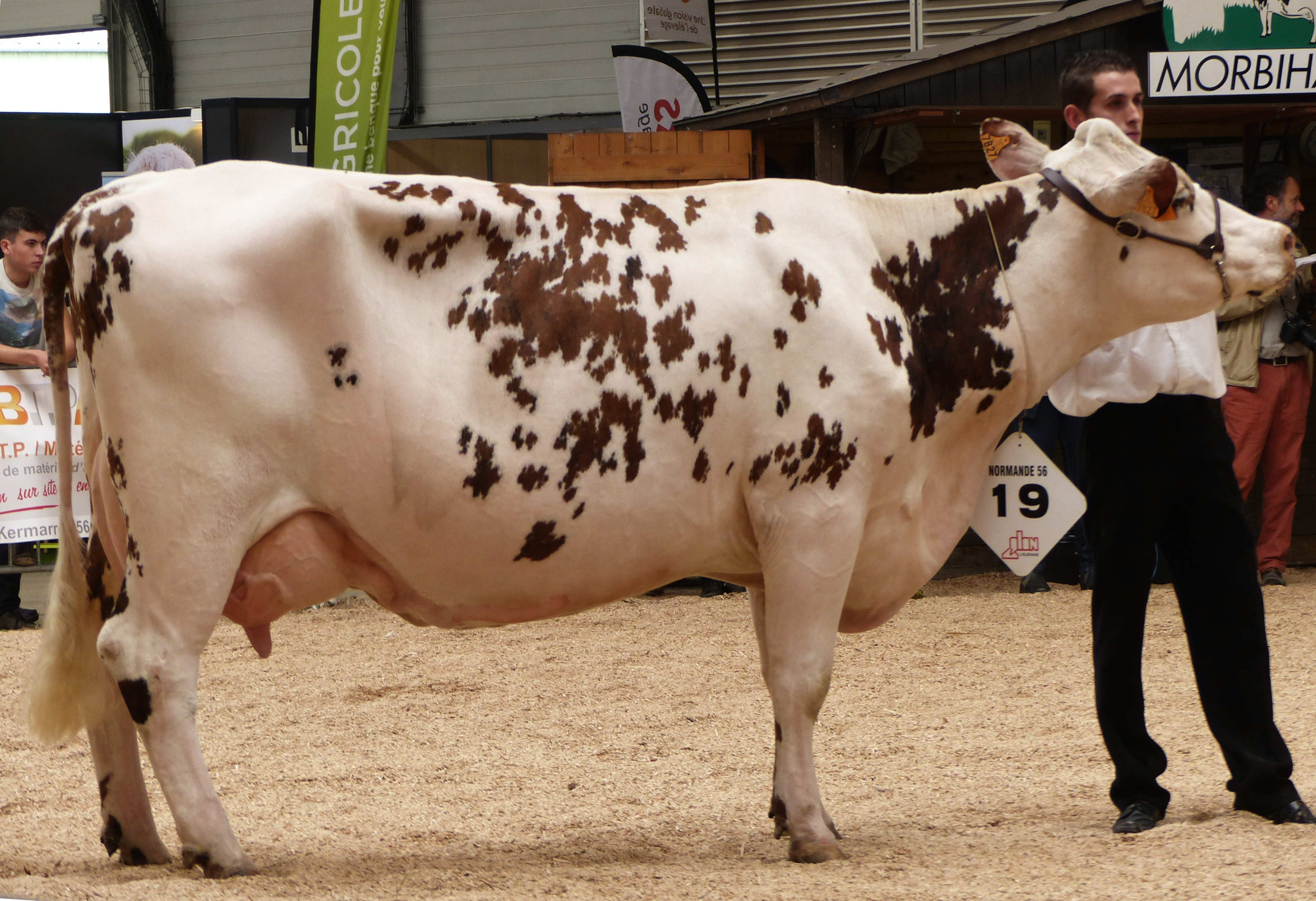 Vache normande sacrée championne de Bretagne au concours régional de Pontivy 2017.